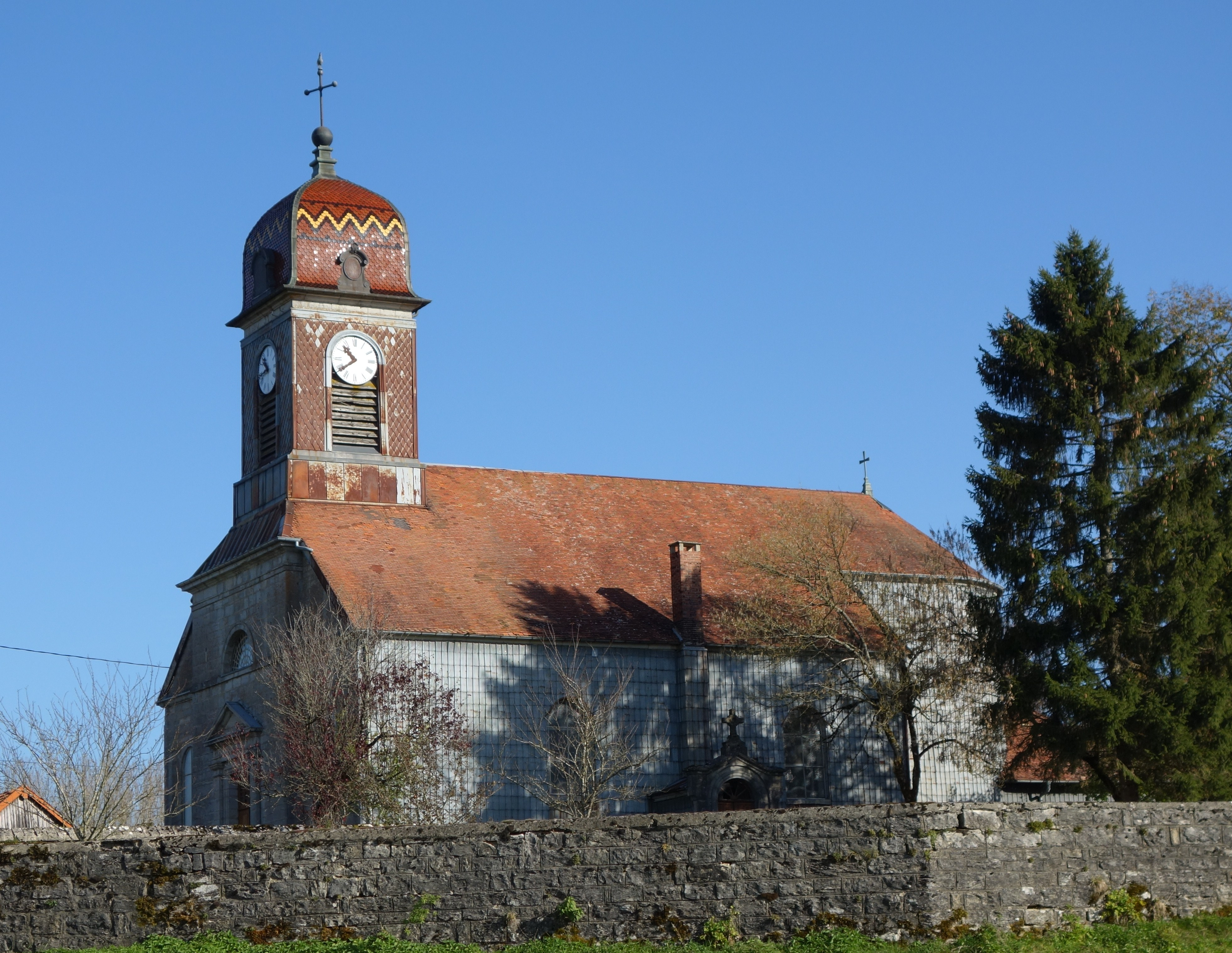 église à clocher comtois de Chapois (Jura) - date : 1823